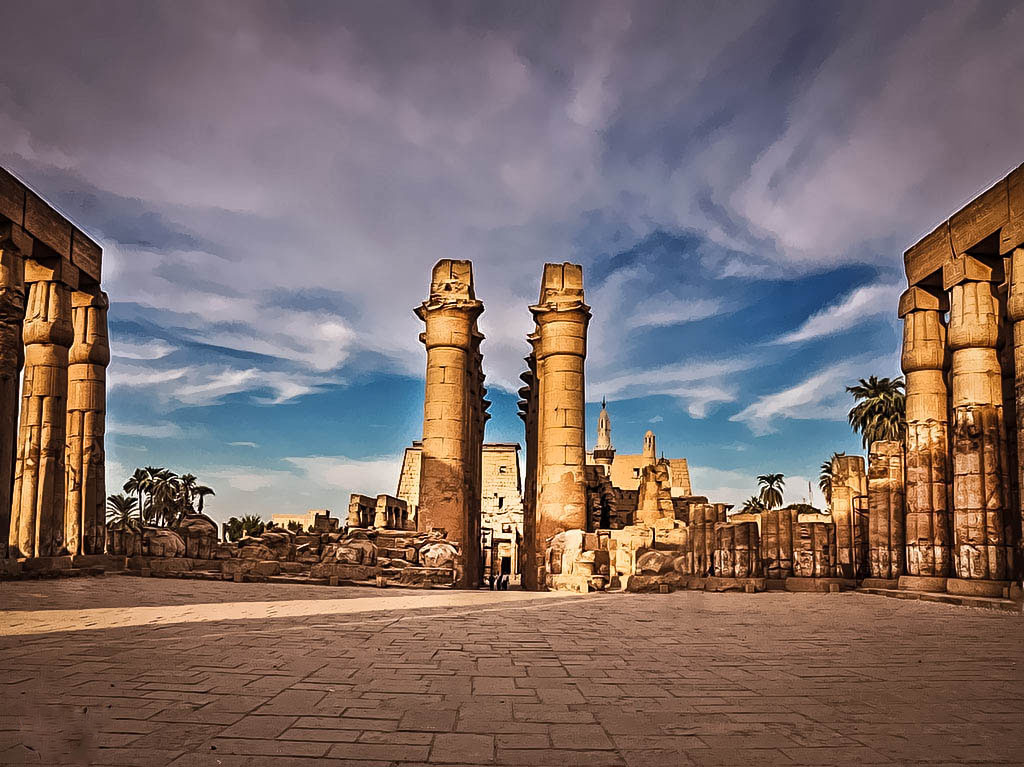 من صور معبد الاقصر